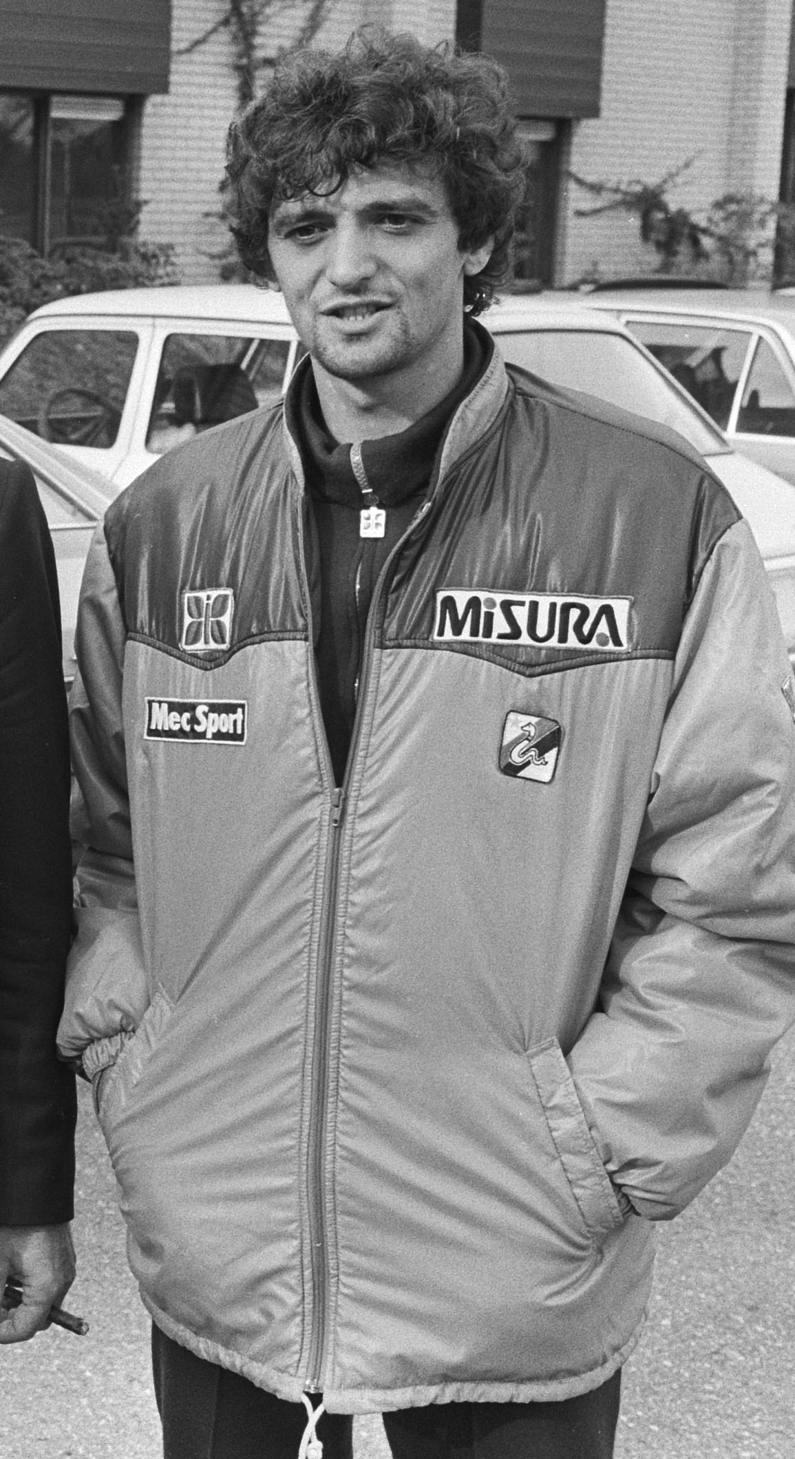 Heilo, Noord-Holland. Inter Milaan in Motel Heilo. Alessandro Altobelli.